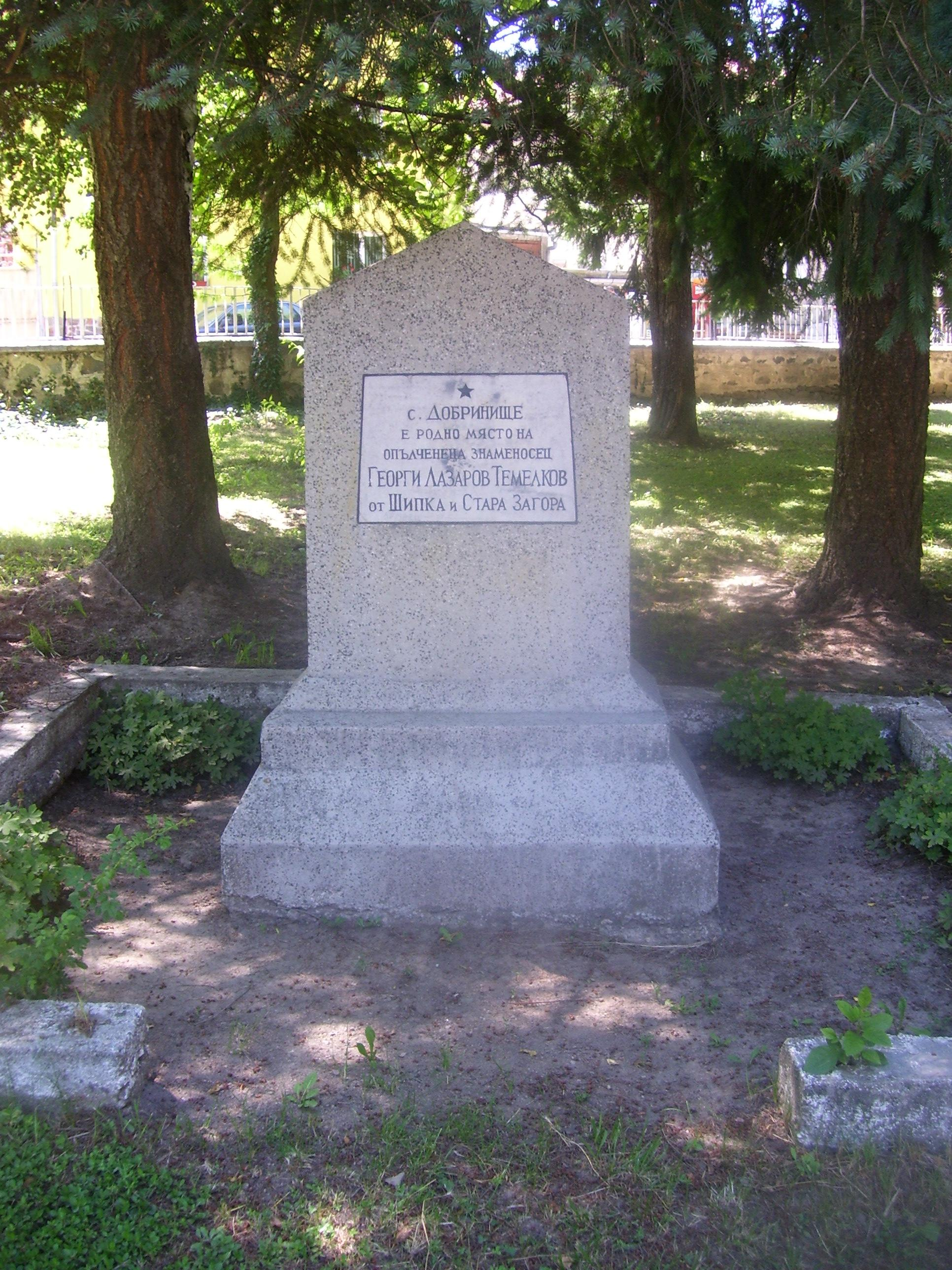 Паметник на опълченеца Георги Лазаров Темелков в парка при банята в Добринище, България.